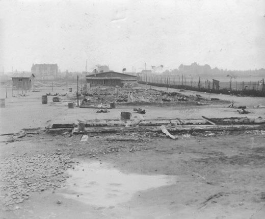 Blick auf die Überreste völlig heruntergebrannter Holzbaracken des Buchenwalder Außenlagers Leipzig-Thekla nach einem Massaker der SS.